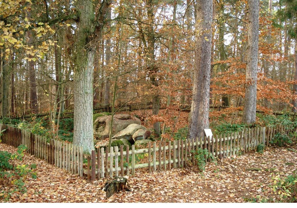 Grosssteingrab Luebeck-Blankensee